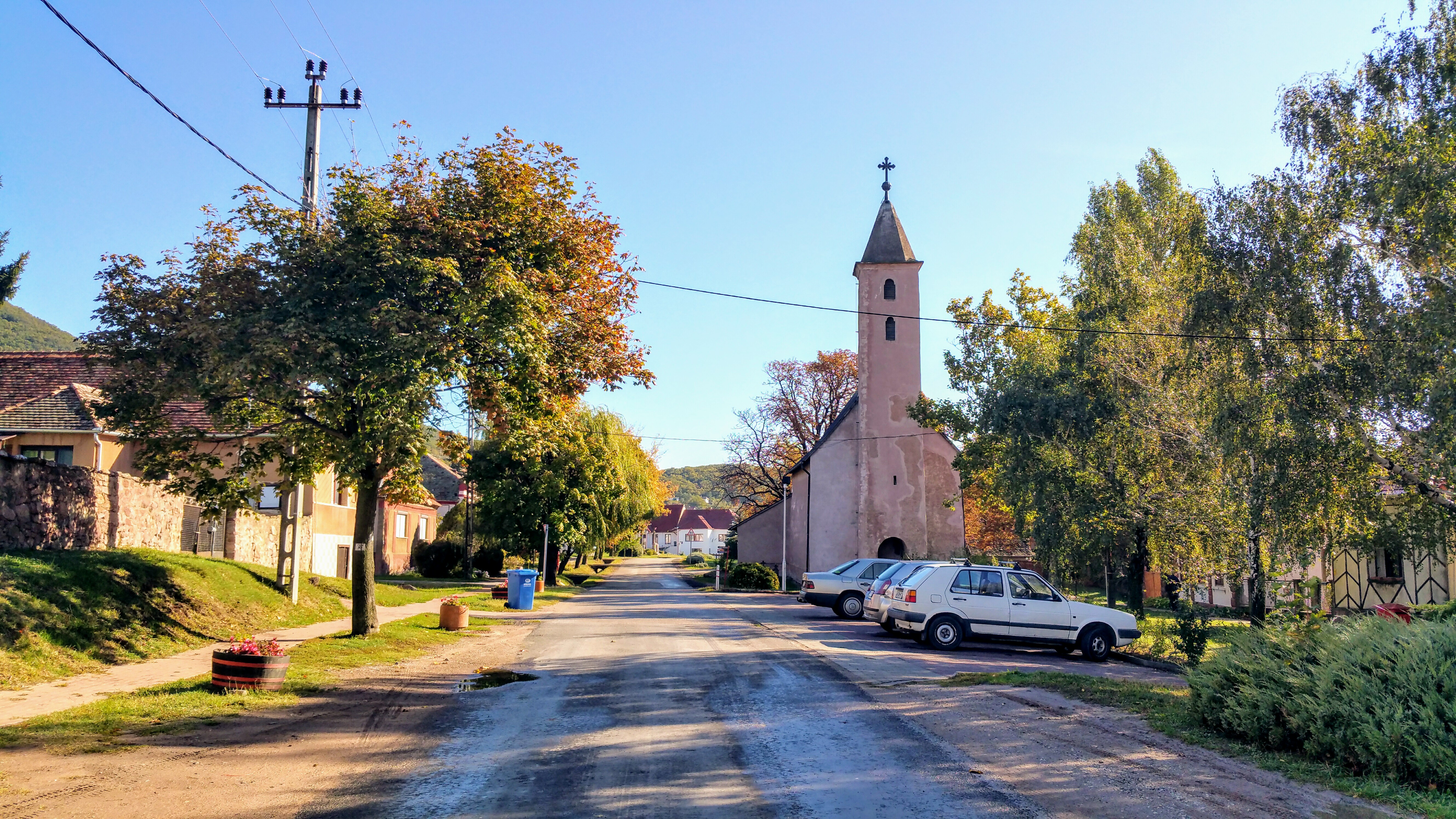 Cserkút, Alkotmány utca a római katolikus templommal